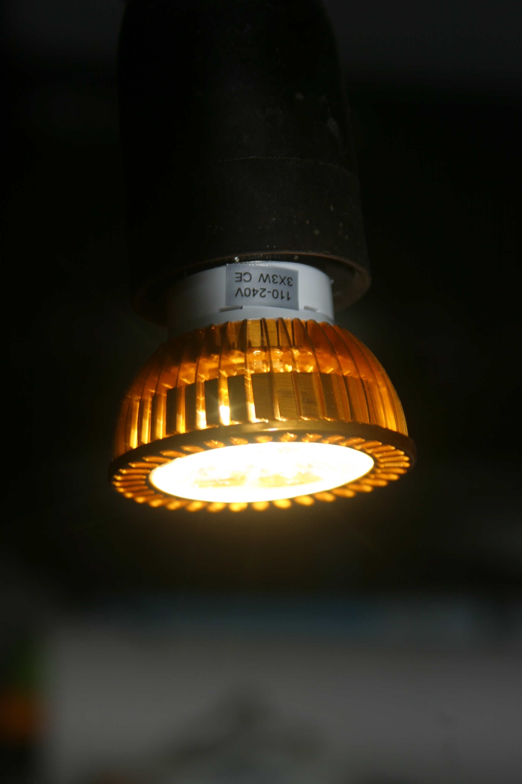 Лампа на трех 3Вт светодиодах под стандартный патрон E27.